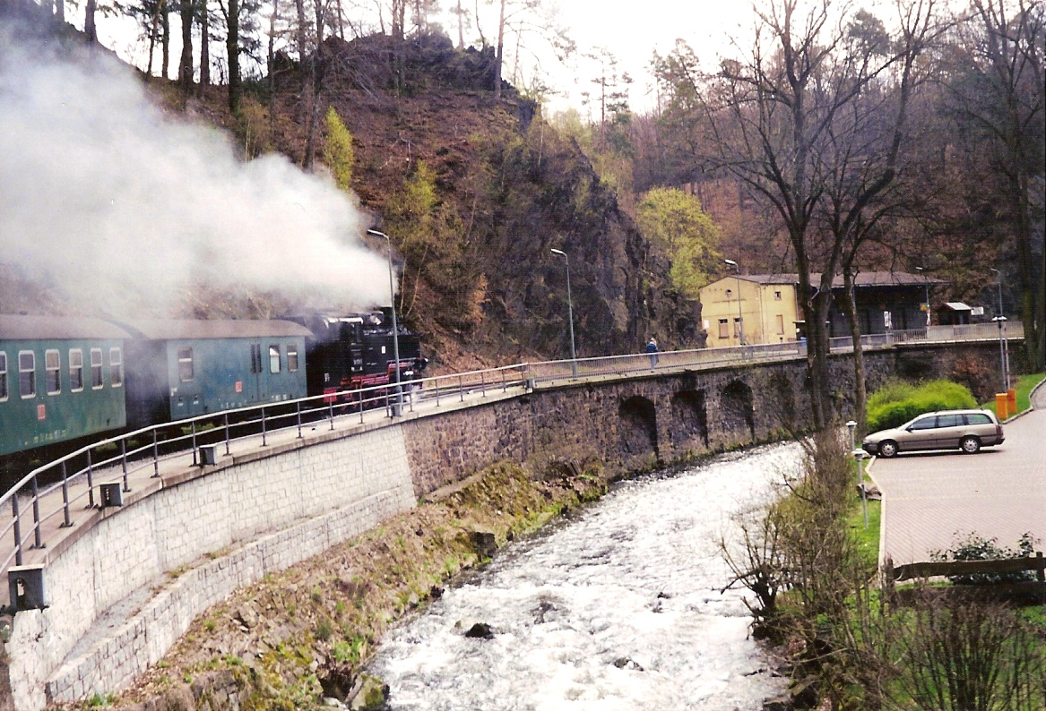 Bahnhof Rabenau, aufgenommen aus einem einfahrenden Zug, Frühjahr 2001